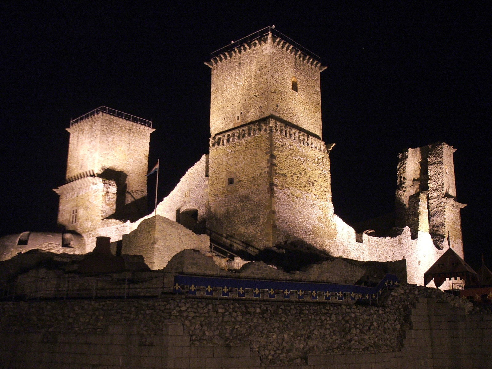 Vár (Miskolc, III. kerület, János utca) This is a photo of a monument in Hungary. Identifier: 2987